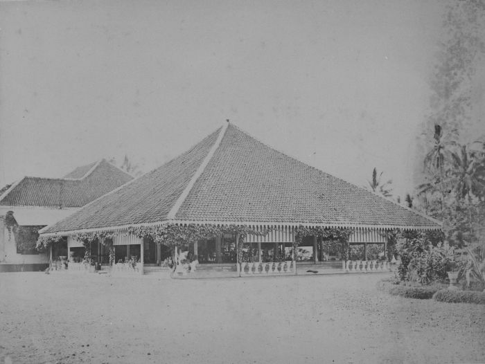 foto. De woning van de regent te Ngandjoek